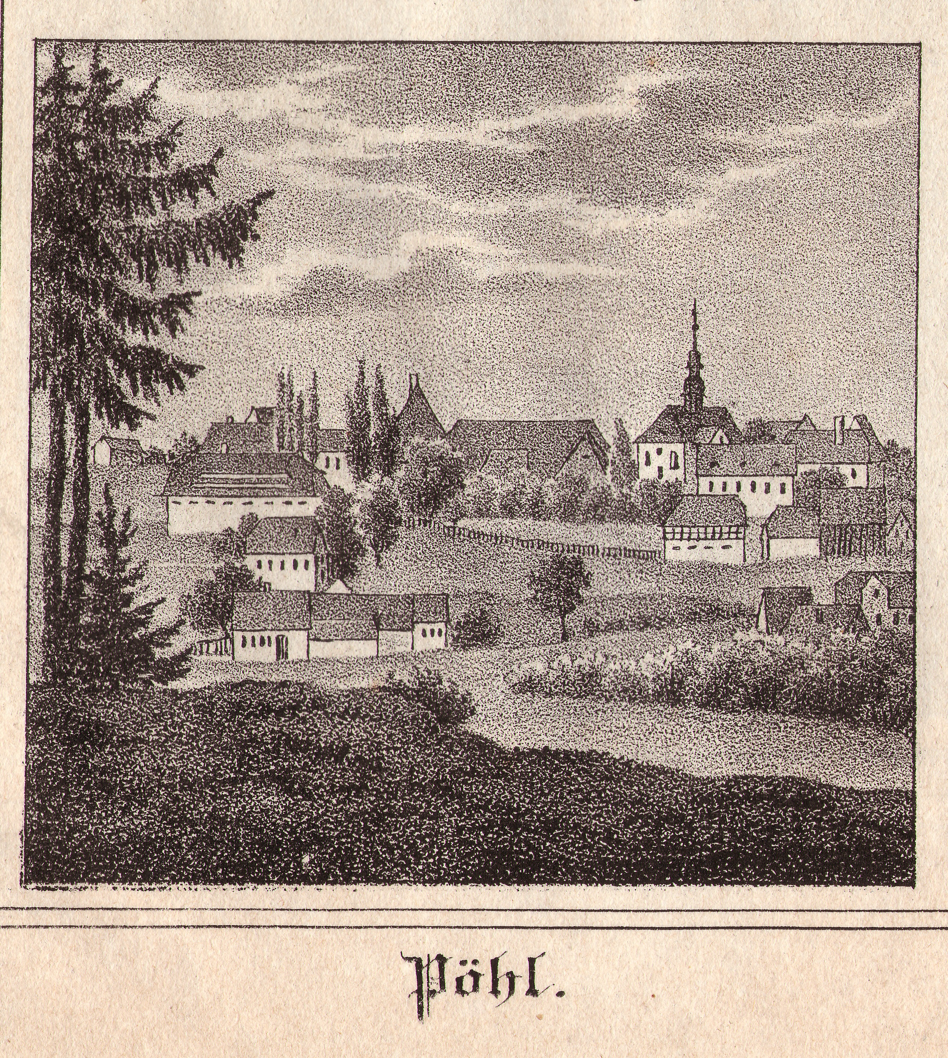 Sachsens Kirchen-Galerie erschien von 1837 bis 1848 im Verlag Hermann Schmidt Dresden und brachte in zahlreichen Lieferungen nach und nach 15 Bände in regionaler Gliederung. In der Regel waren die jeweils amtierenden Pfarrer die Verfasser und beschrieben die Kirchorte. Sie schilderten die Kirchen, deren Baugeschichte, Baustil und Ausstattung wie Altar, Taufstein, Gemälde, Orgel, Glocken, berichteten über die Schulverhältnisse, über die Namen der Pfarrer, die in der jeweiligen Gemeinde nacheinander tätig waren, erwähnten die Inhaber der Rechte zur Besetzung der Pfarrerstelle. Die Beiträge sind nicht einheitlich gestaltet. Nicht selten ist eine regelrechte Ortsgeschichte zusammengestellt. Im Band 11 von 1844 – Voigtland – finden sich zahlreiche Abbildungen, die oft nicht nur den Kirchenbau, sondern auch dessen Umgebung, das Dorf oder die Landschaft zeigen. Zu den Verfassern gibt es diese Angaben: „Nach der Natur gezeichnet von W. Wegener“ und „Steindruck von I. H. Ketschau“ (Angaben sind auf den Grafiken teilweise abgekürzt).Ansicht der Siedlung mit Kirche in Pöhl.